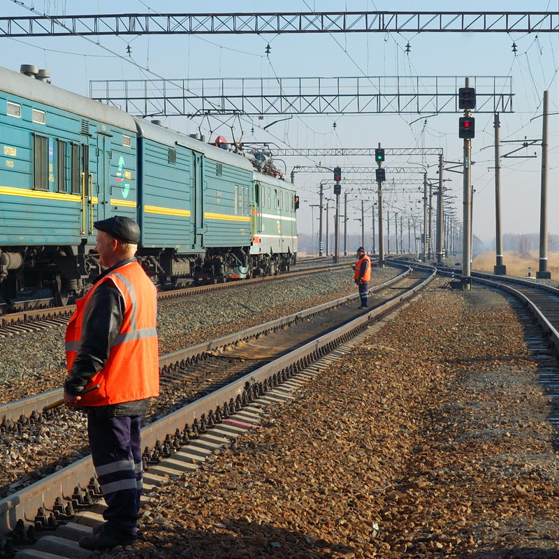 Электровоз ЧС2 с пассажирским поездом проследует нечётную горловину ст. Кабаклы, З-СИБ ЖД